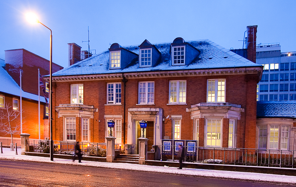 Sutton Police Station